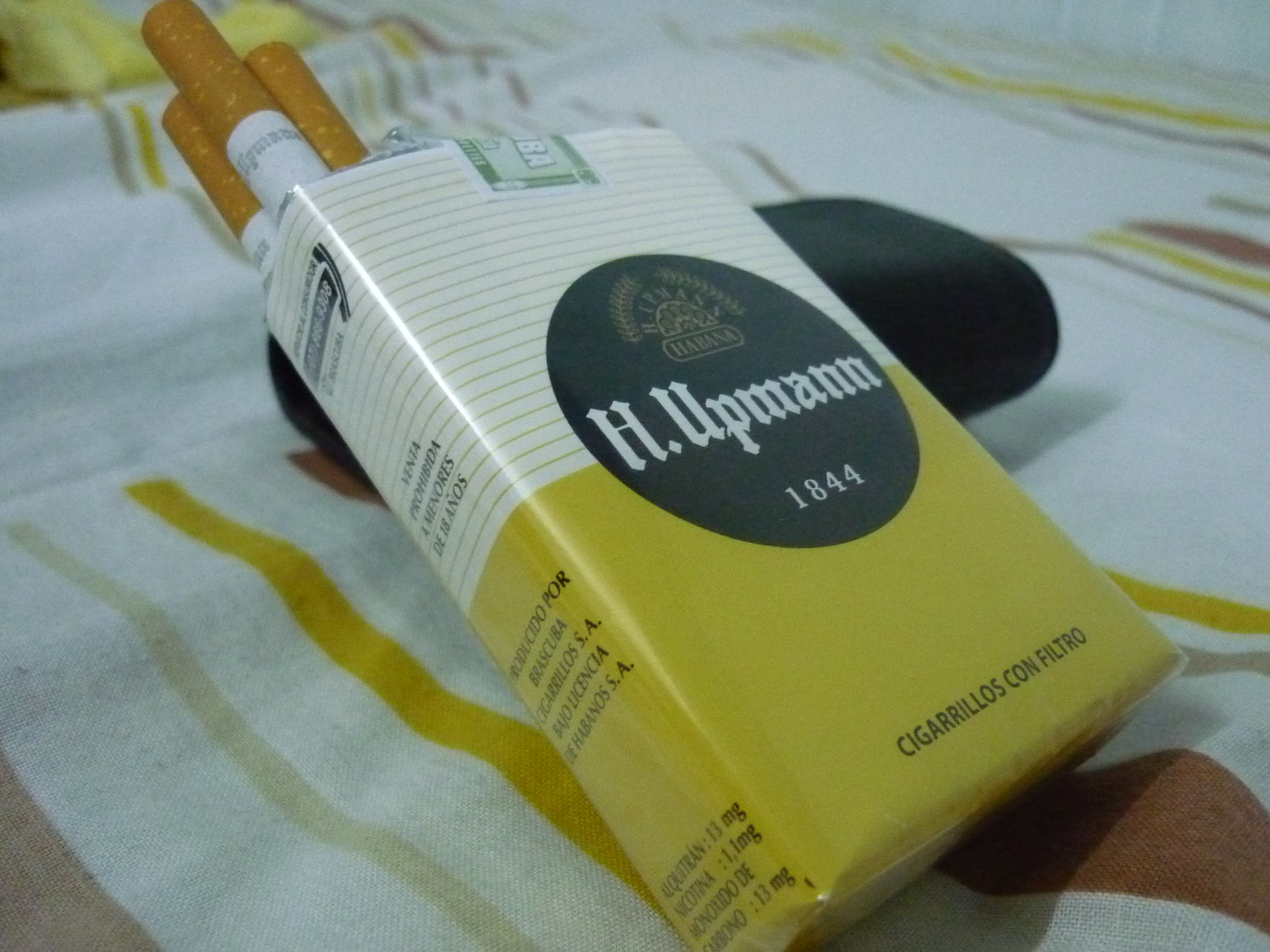 Cigarros H Upmann